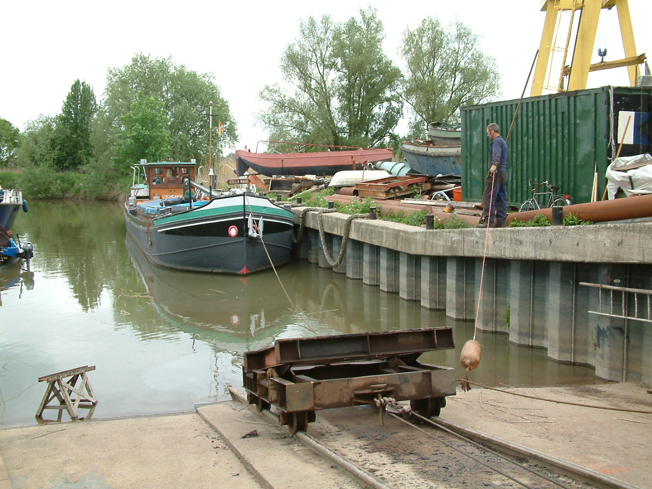 Hellingwagens van een werf in Hardinxveld-Giessendam